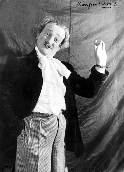 portrett, mann, skuespiller, rollebilde, stående knefigur.